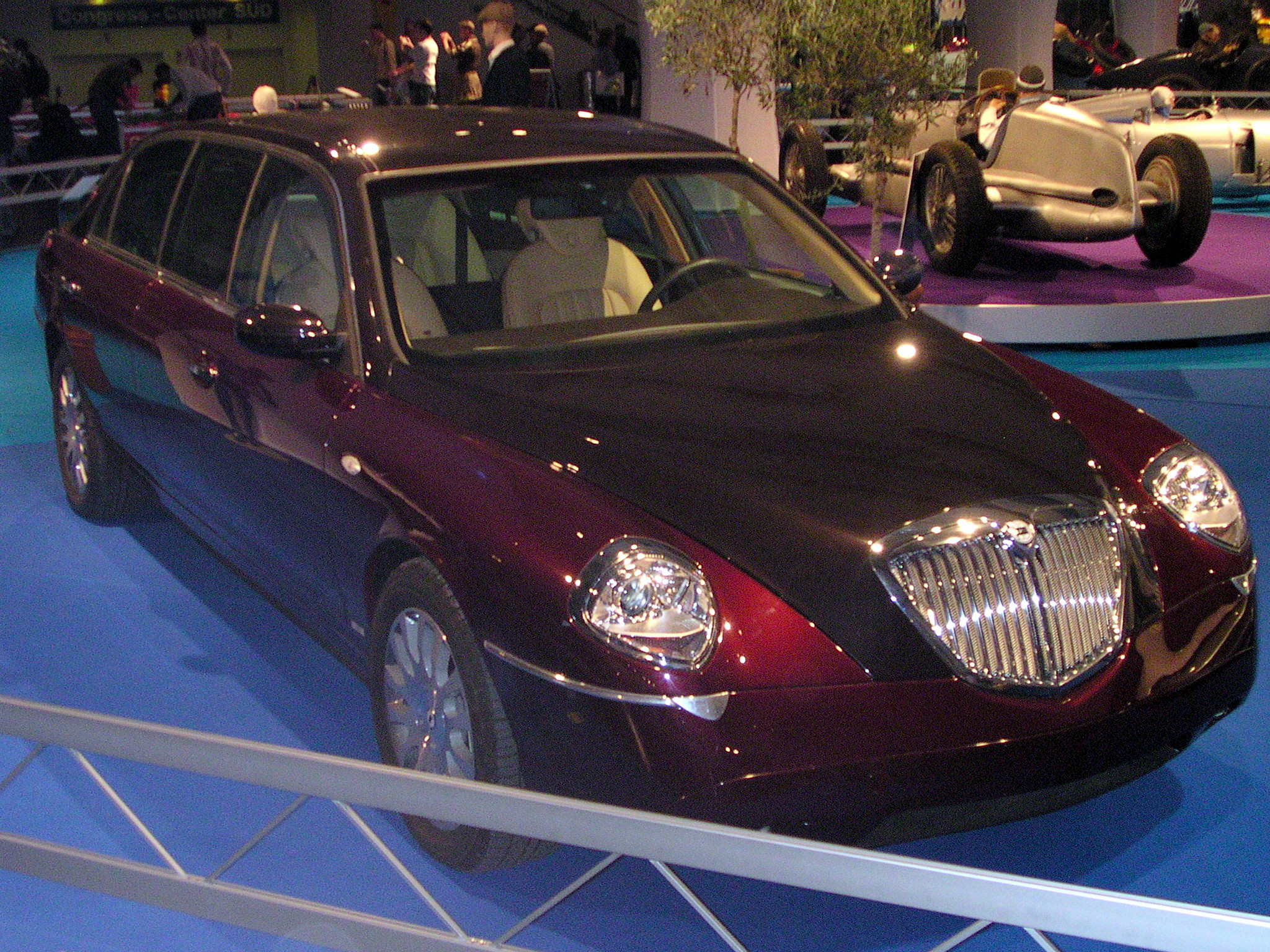 Lancia Thesis als Stretch-Limousine bei der Essener Motorshow 2004